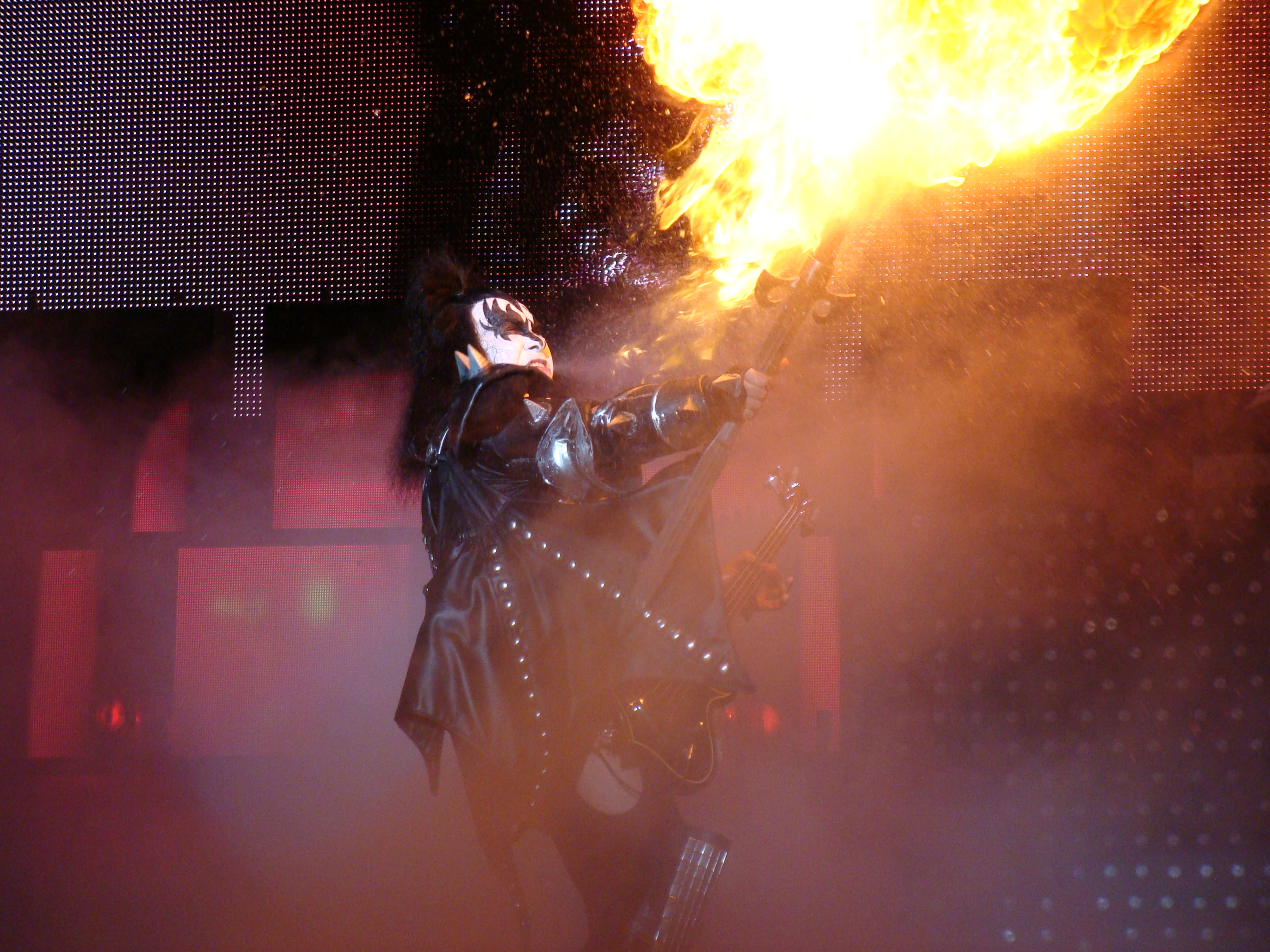 Gene Simmons, en una actuación del grupo KISS en Vitoria-Gasteiz, en el Azkena Rock Festival.